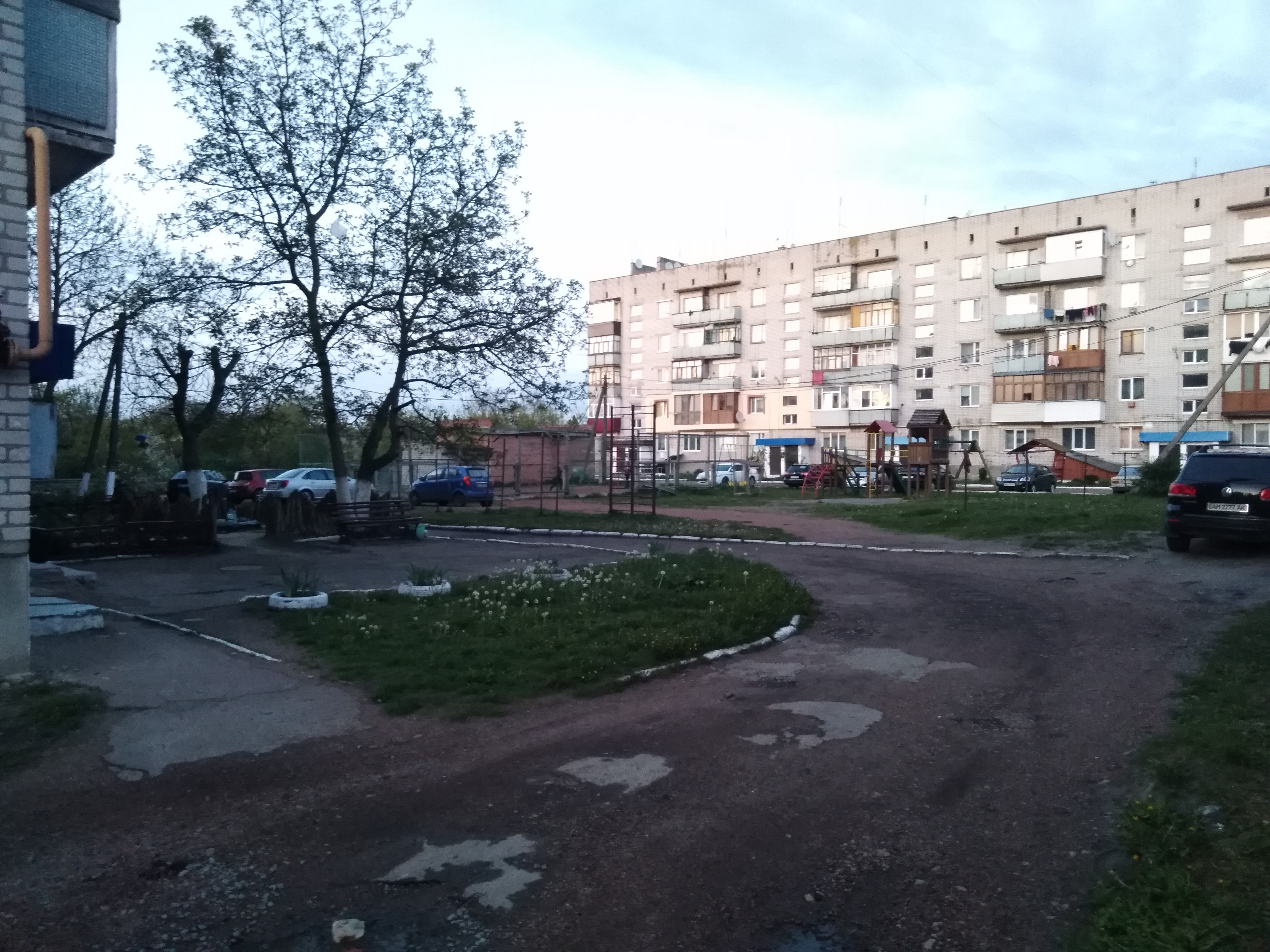 Міська забудова